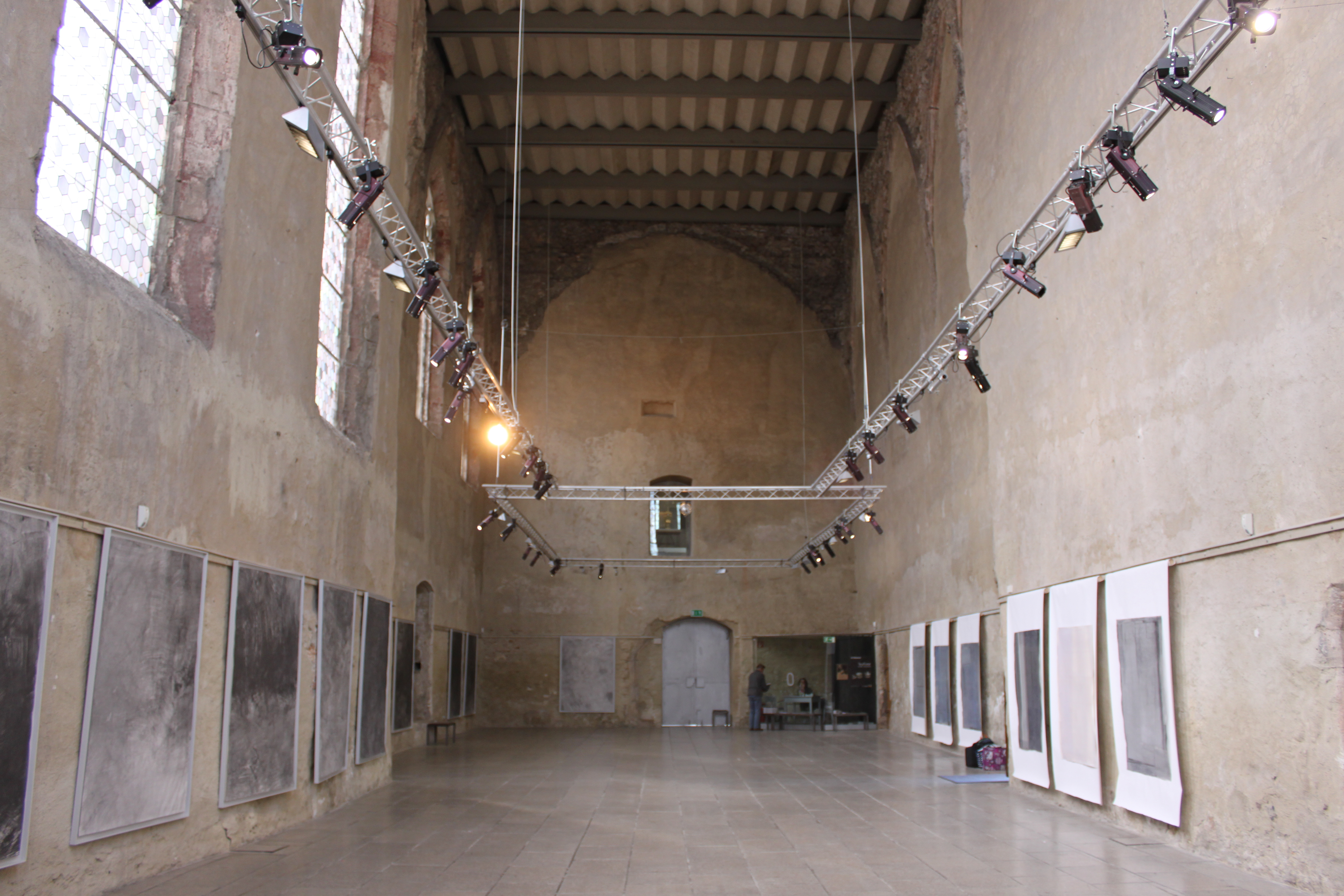 Ehemalige Dominikanerinnenkirche, vom Chor Richtung Langhaus, Ausstellung LICHTWECHSEL Alex Klein - Helmut Swoboda 4. Mai bis 2. Juni 2013